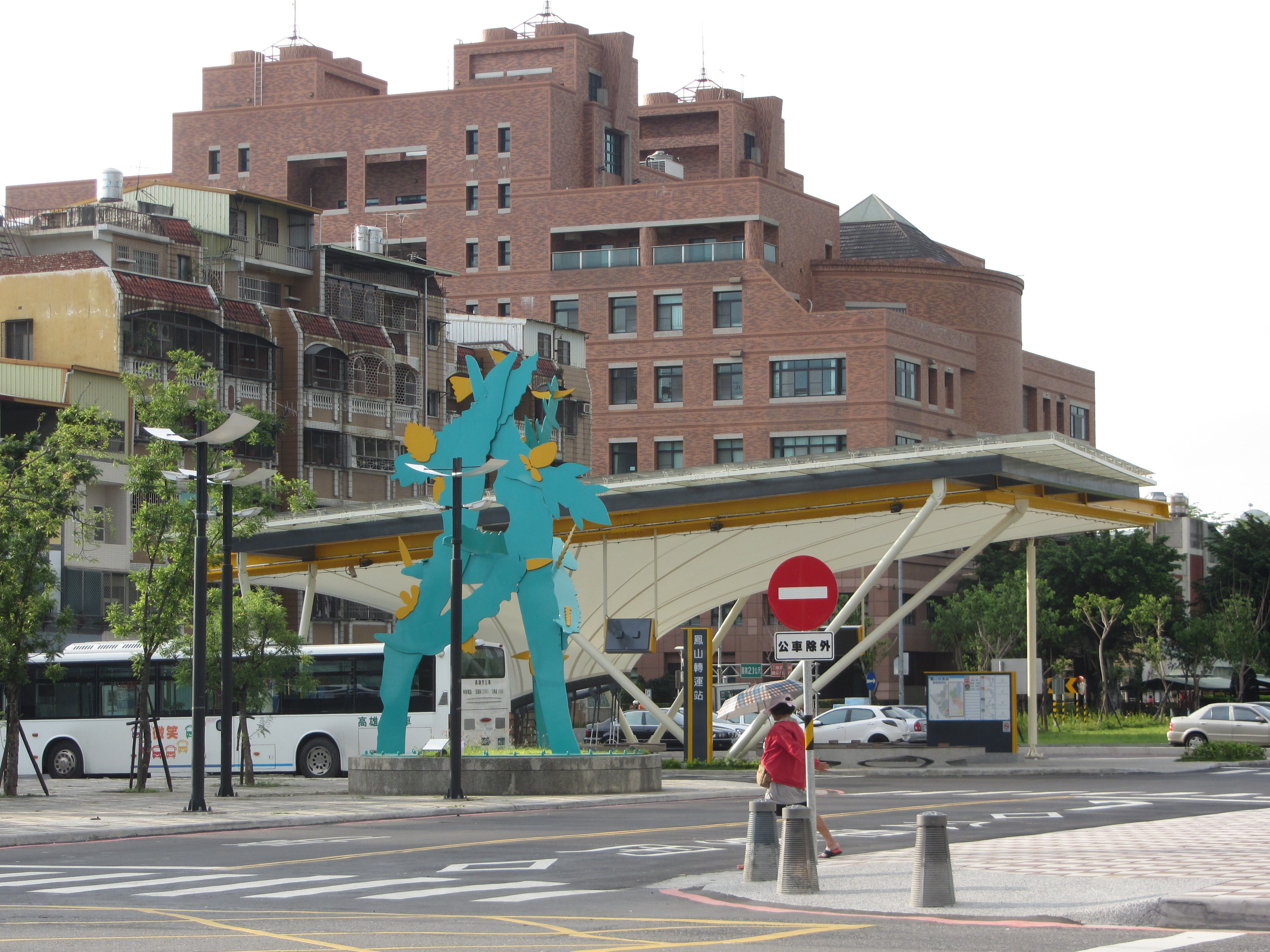 高雄市公車鳳山轉運站